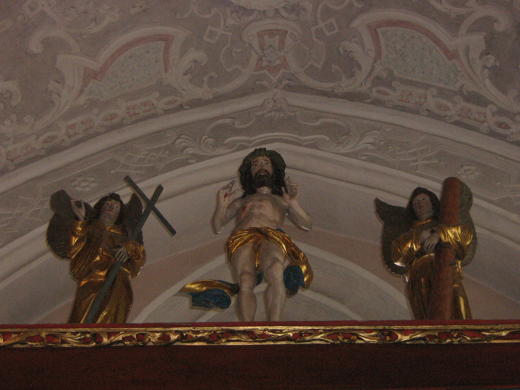 Gotischer Altaraufsatz in der evangelischen Kirche St. Peter und Paul, Erlangen-Bruck